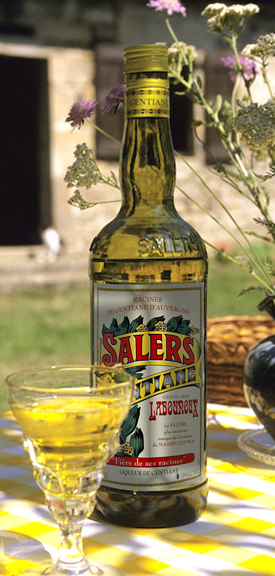 Verre apéritif gentiane Salers dans un buron d'Auvergne